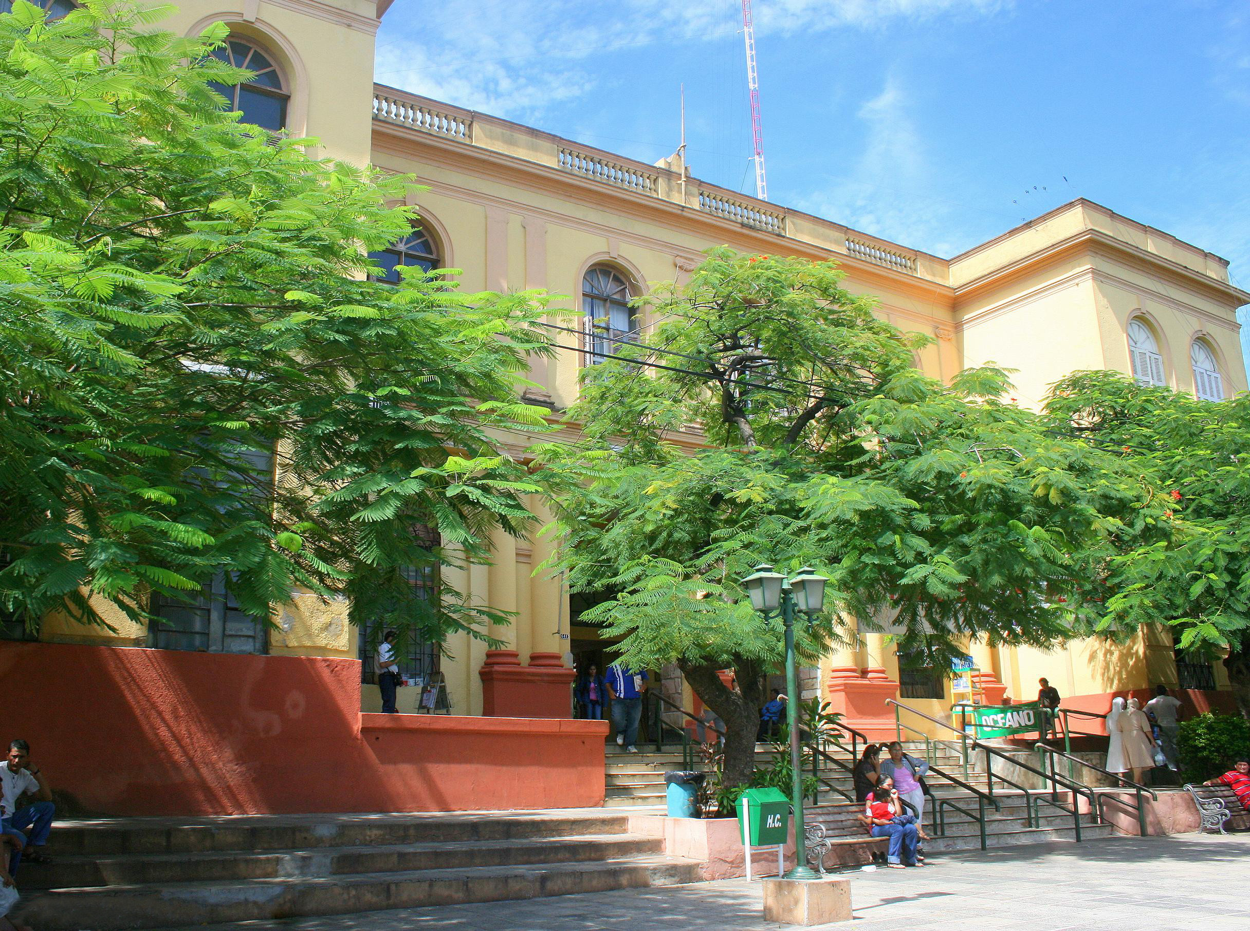 Histórico Hospital de Clínicas de Paraguay en Asunción.